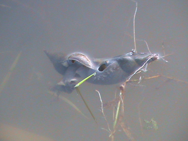 Ставковик: Фото